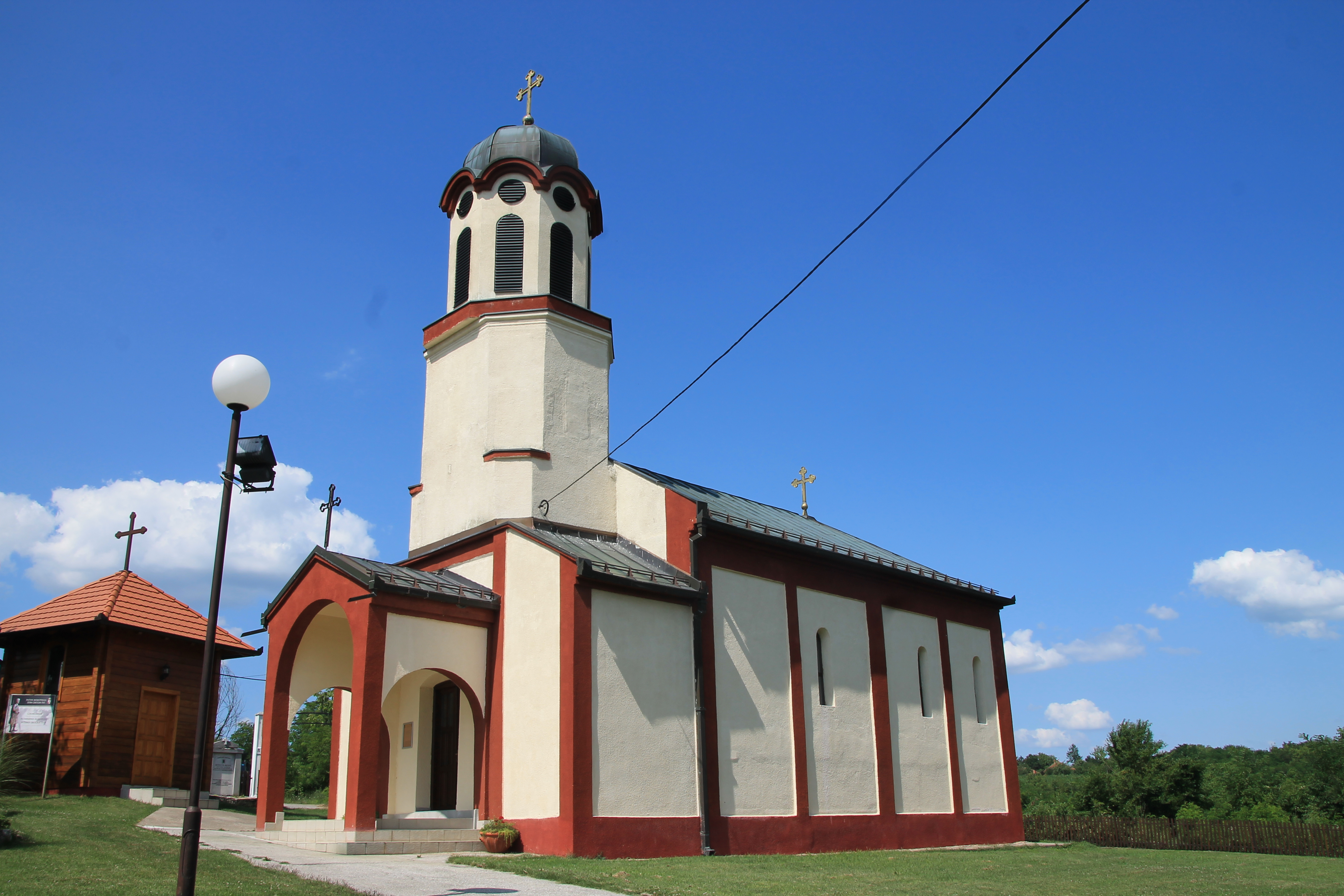 Crkva Sv. Nikole (Barajevo)